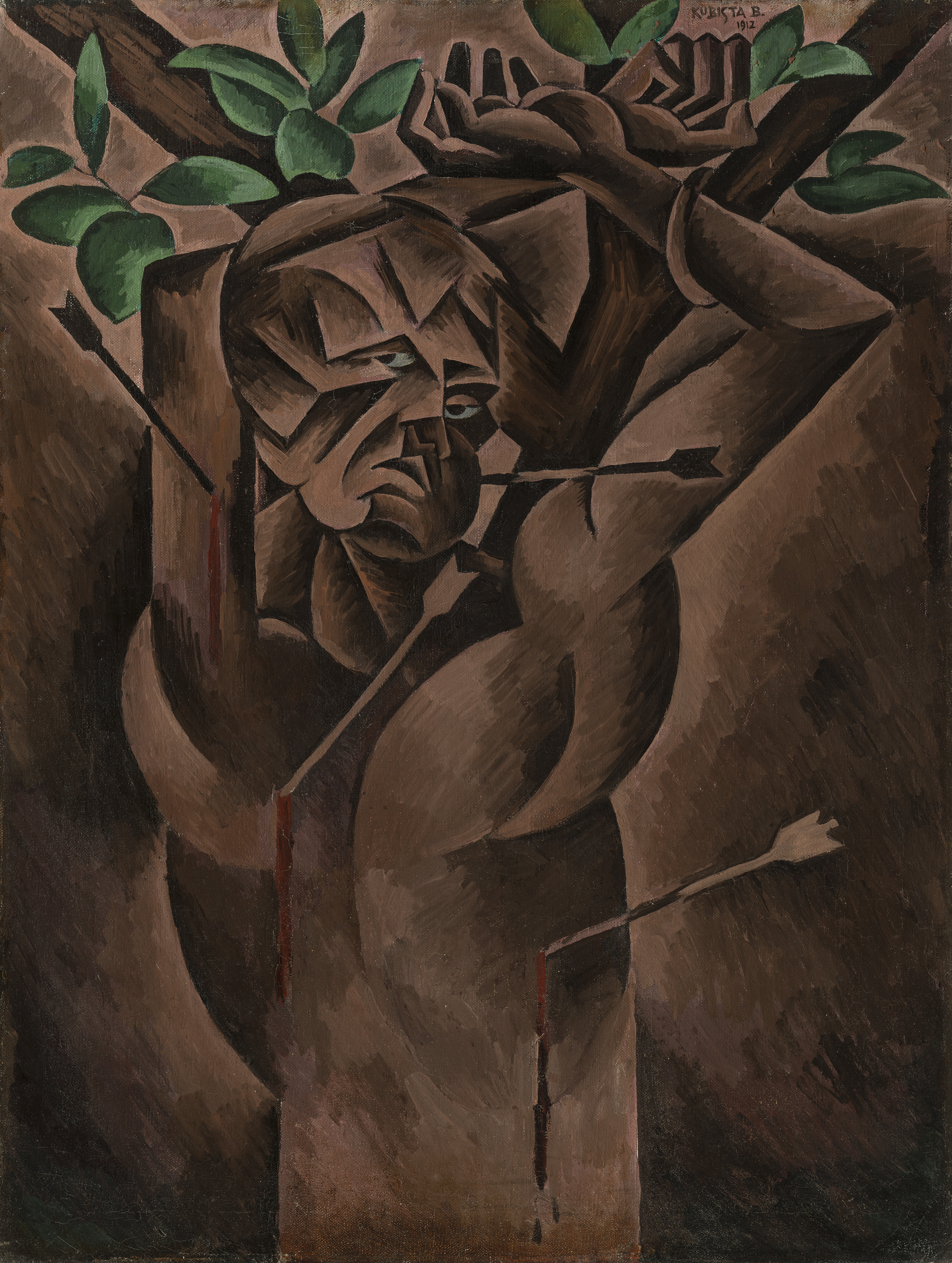 Obraz sv. Šebestiána od Bohumila Kubišty.